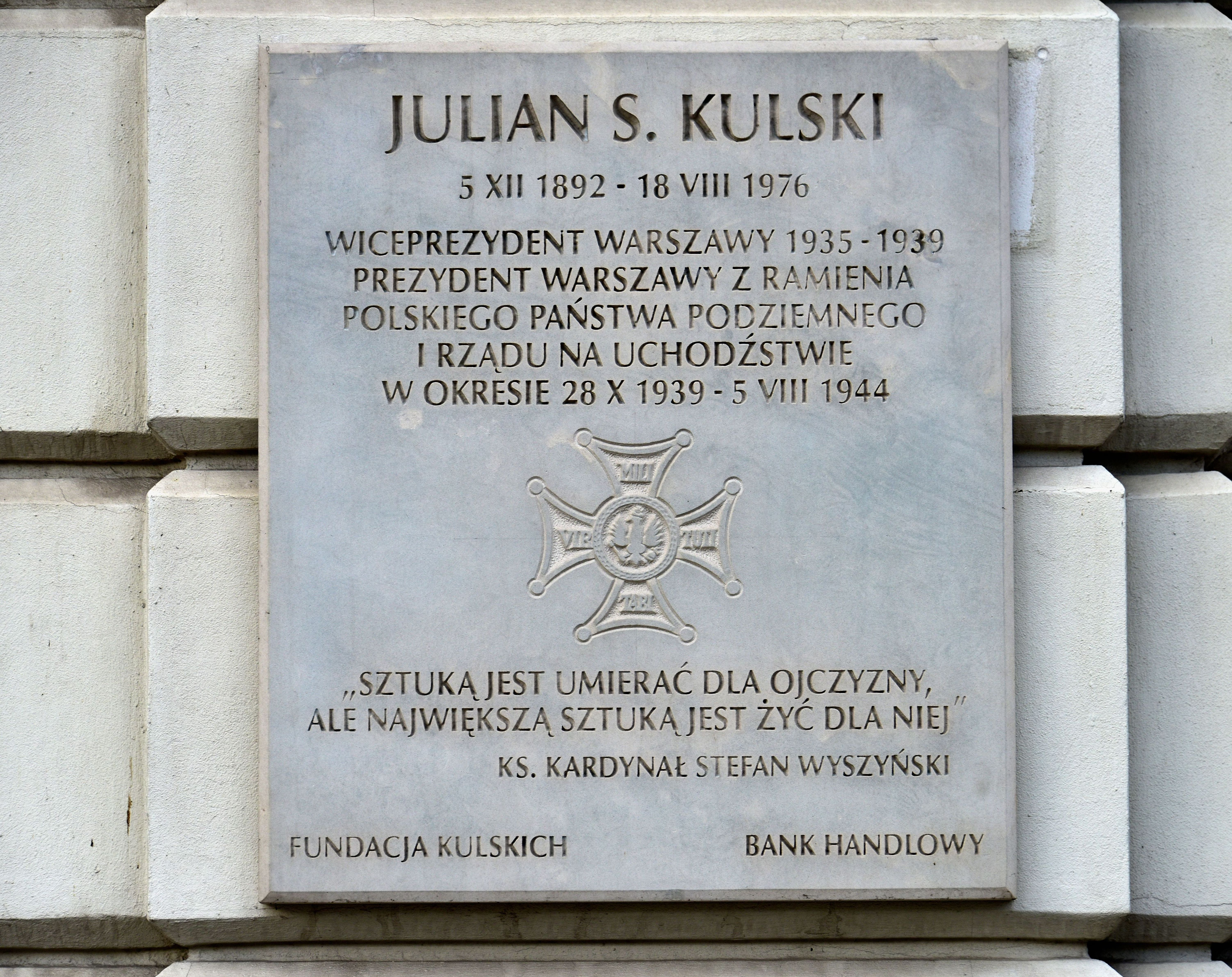 Tablica upamiętniająca Juliana Kulskiego na fasadzie pałacu Jabłonowskich w Warszawie